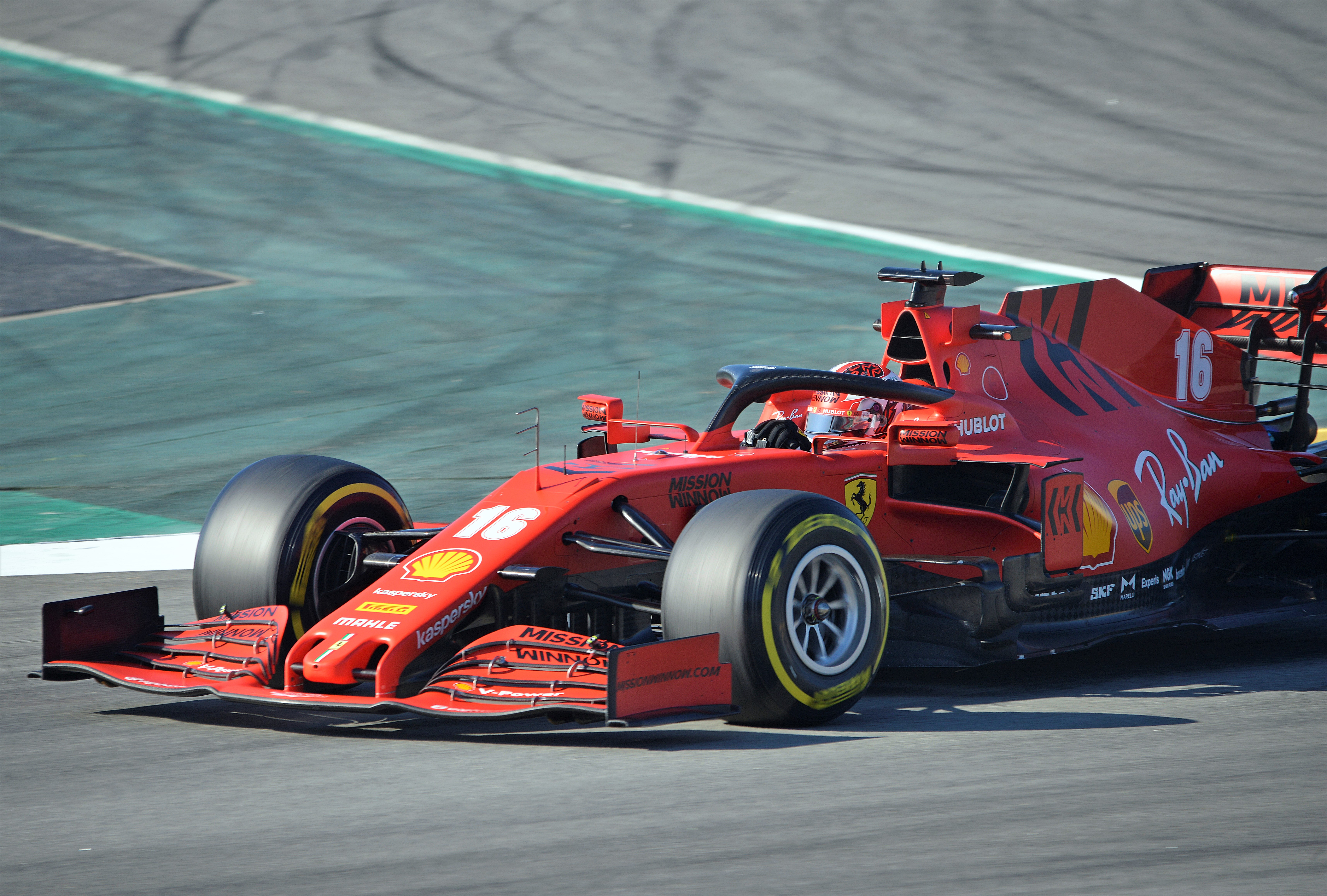 Tets Days F1 2020